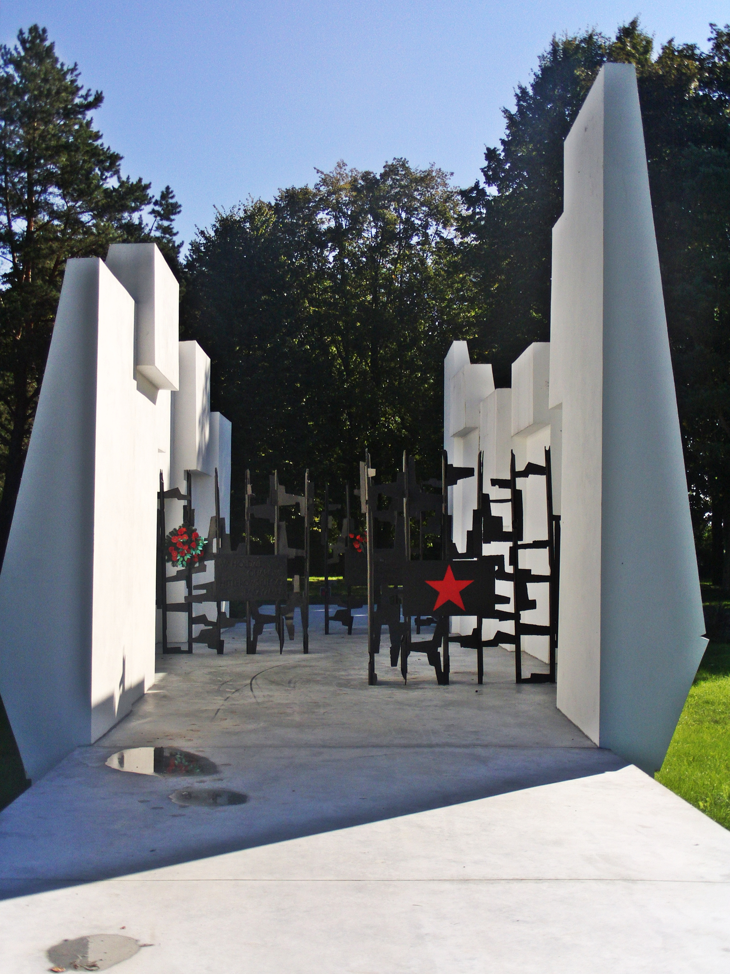 Suwałki - Cmentarz Żołnierzy Radzieckich w Suwałkach. Główny pomnik, zaprojektowany przez suwalskiego architekta Andrzeja Szulca od frontu (zabytek nr A-832 z 26.08.1991)